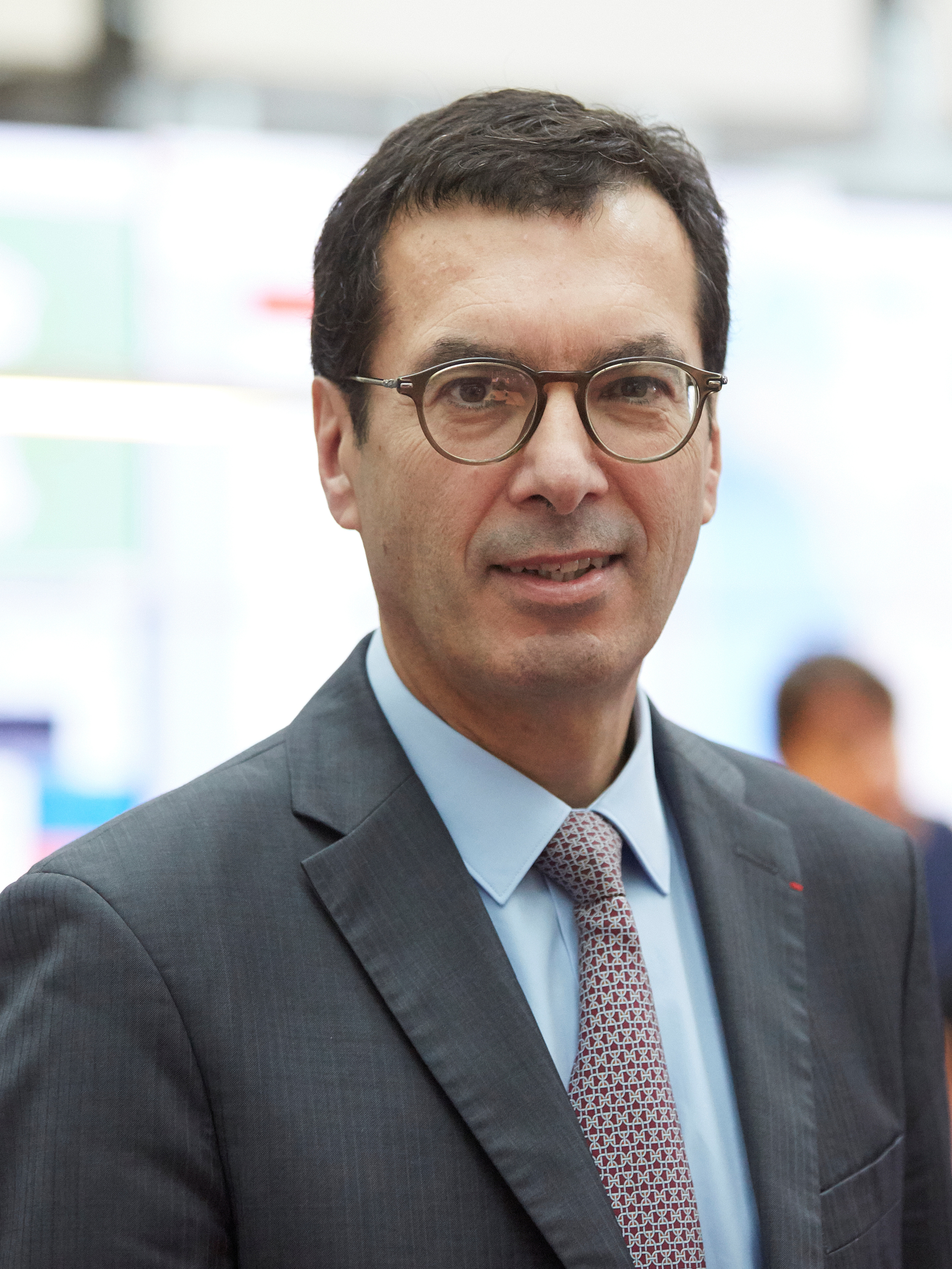 Jean-Pierre Farandou, Président SNCF